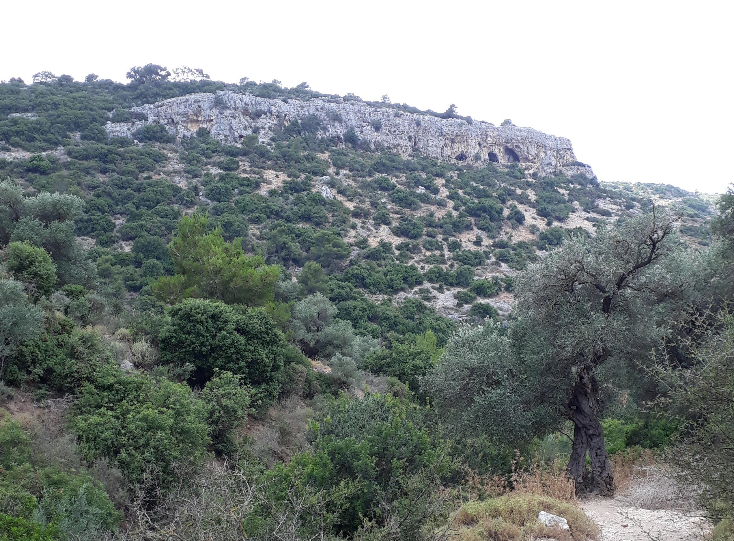 מערת אורנית, הכרמל, מבט מנחל גלים